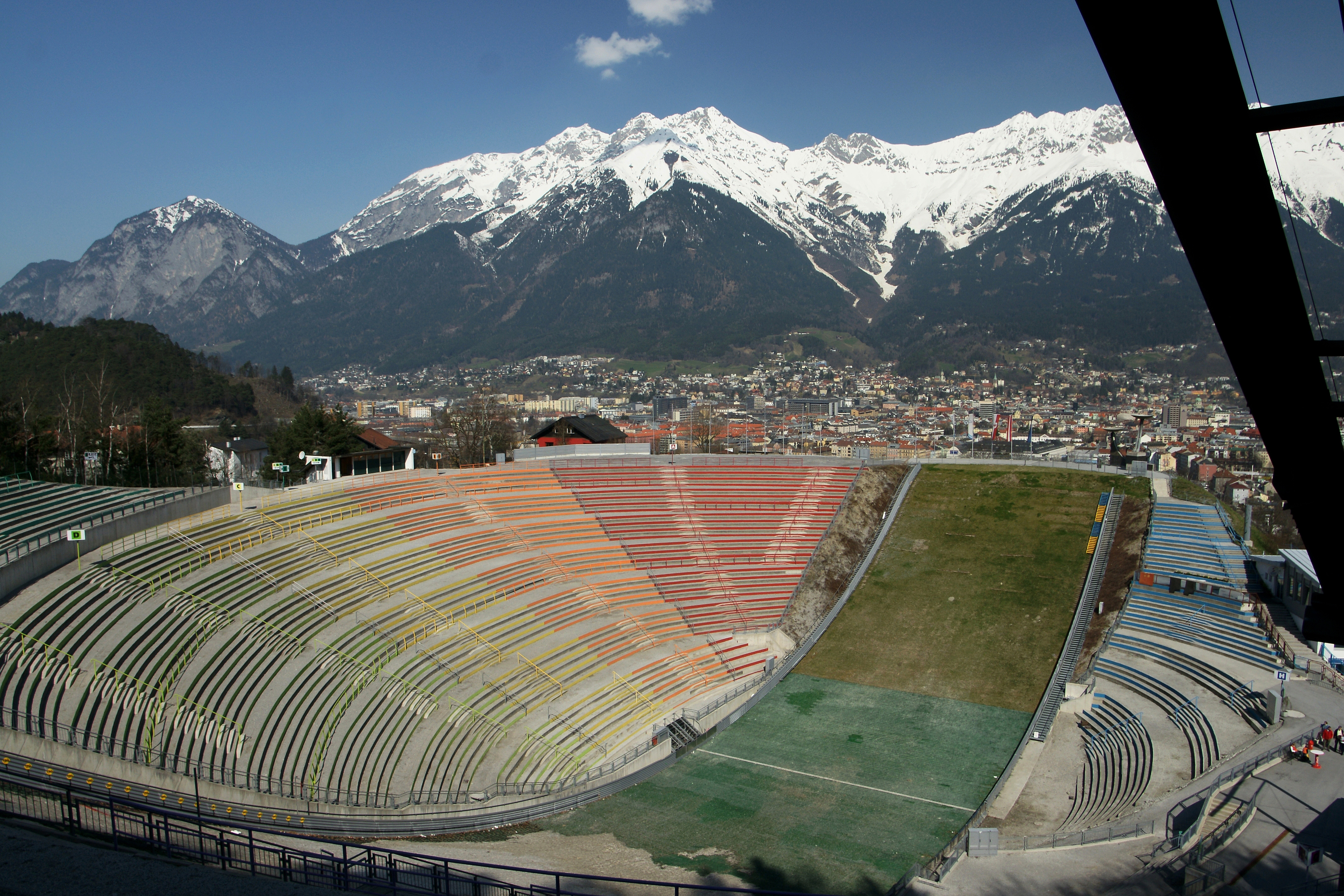 Die Zuschauerarena der Bergiselschanze mit Blick auf Innsbruck mit der noch schneebedeckten Nordkette.